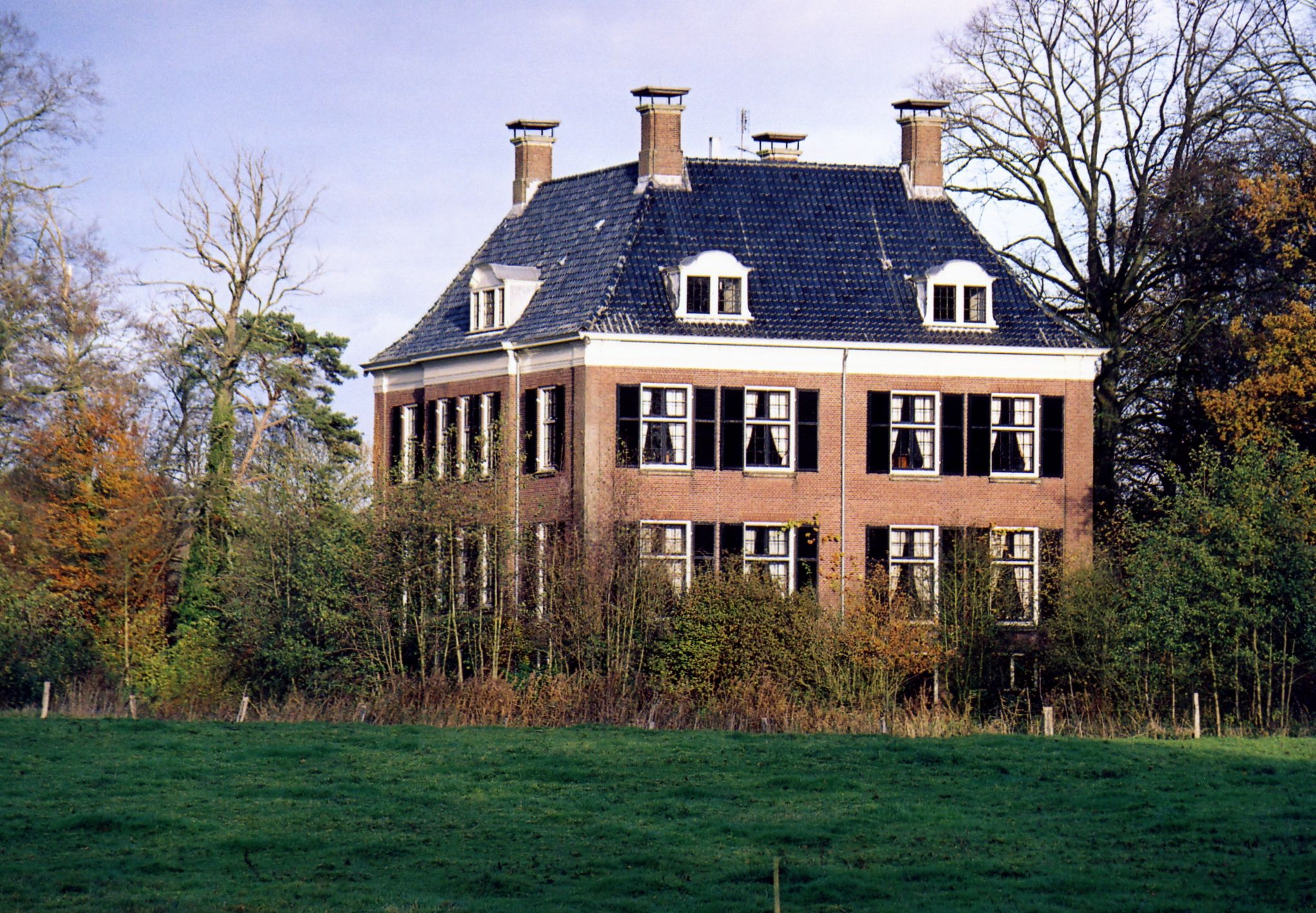 Kasteel Dorth te Kring van Dorth.